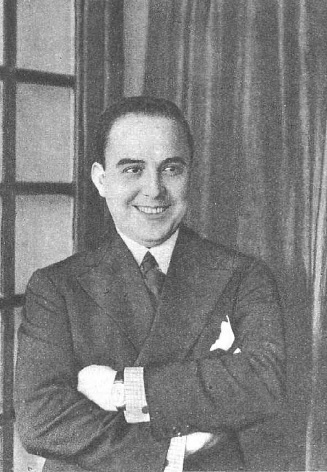 Fotografía del escritor español Luis Fernández Ardavín publicada en 1927 con motivo del estreno de su obra teatral La hija de la Dolores.